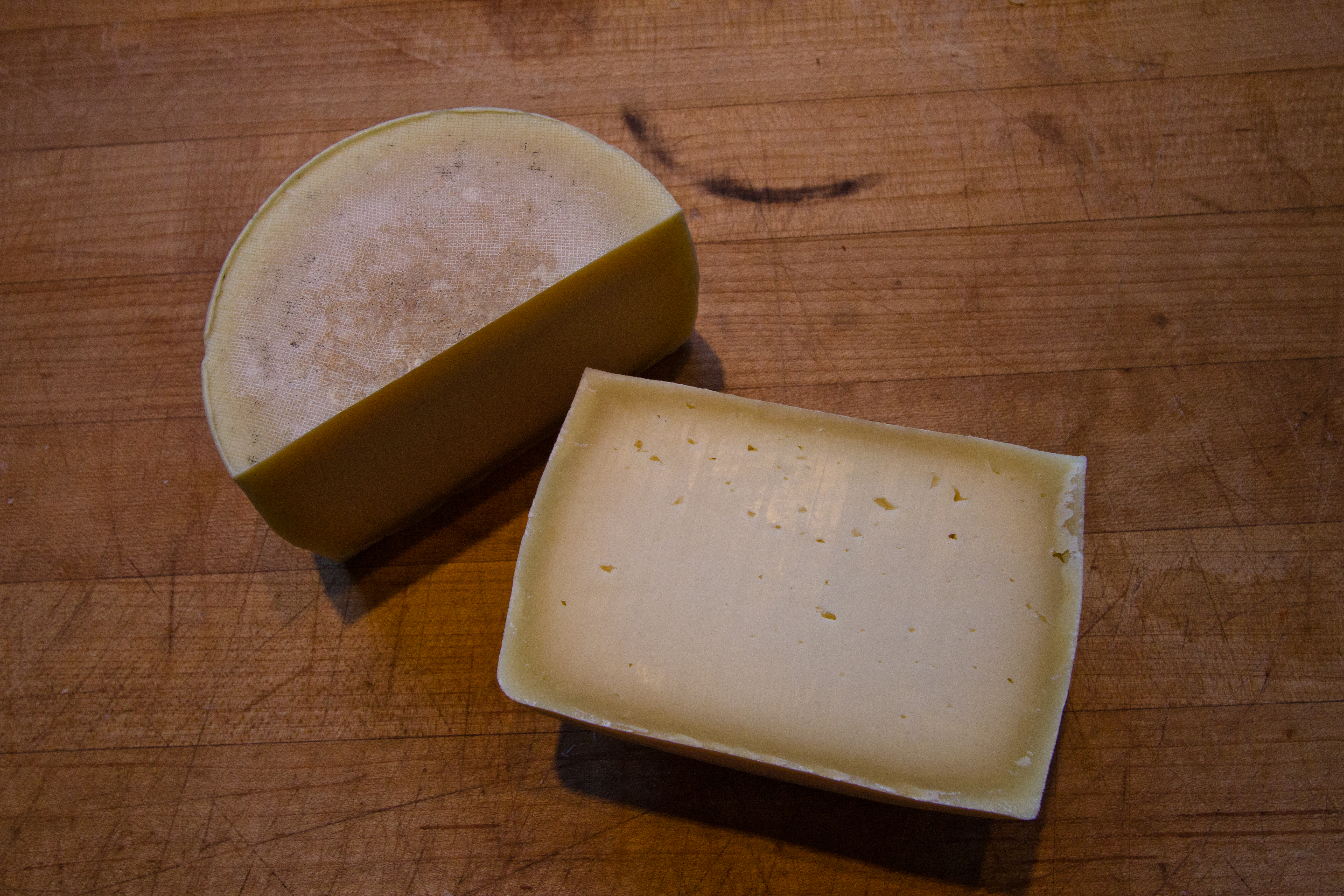 Romano, 3 Months